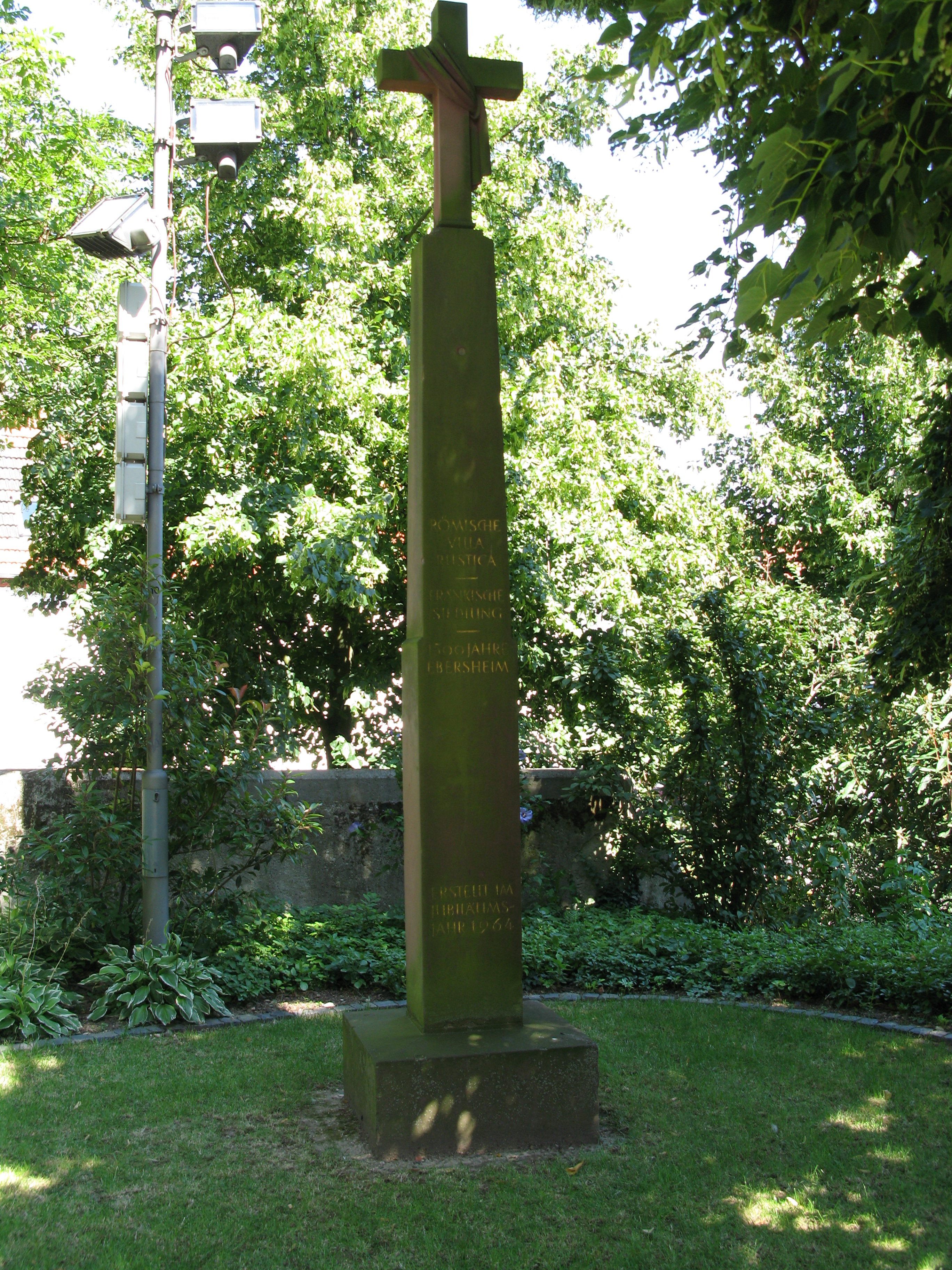 Denkmal 1500 Jahre Ebersheim (1964). Steht östlich von St. Laurentius.